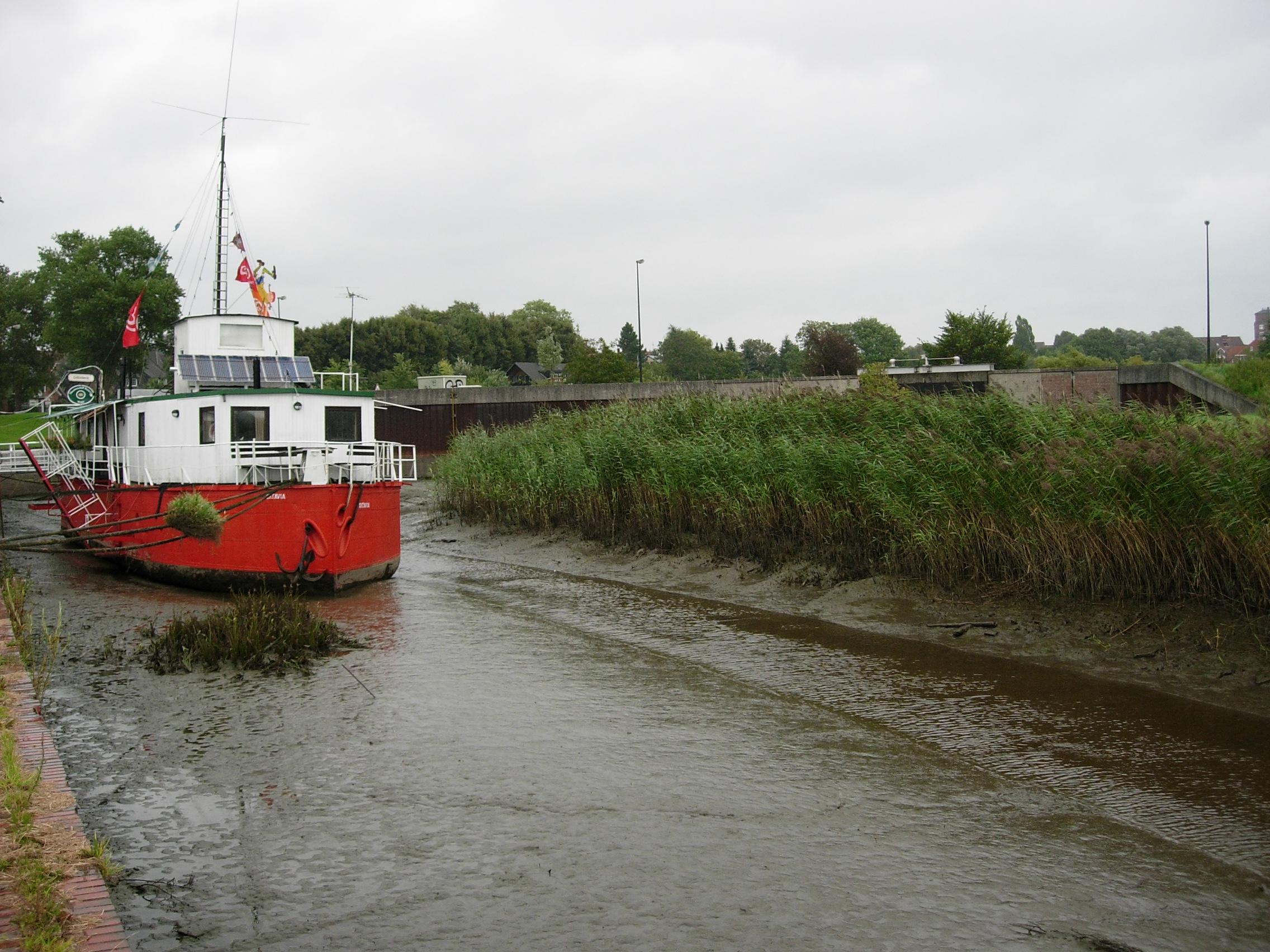 Theaterschiff Batavia am Unterlauf der Wedeler Au bei Ebbe